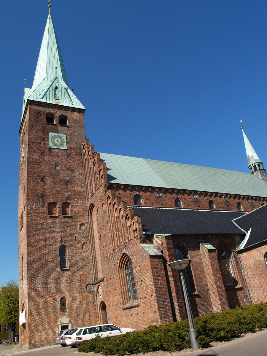 Sankt Olai kirke Helsingør